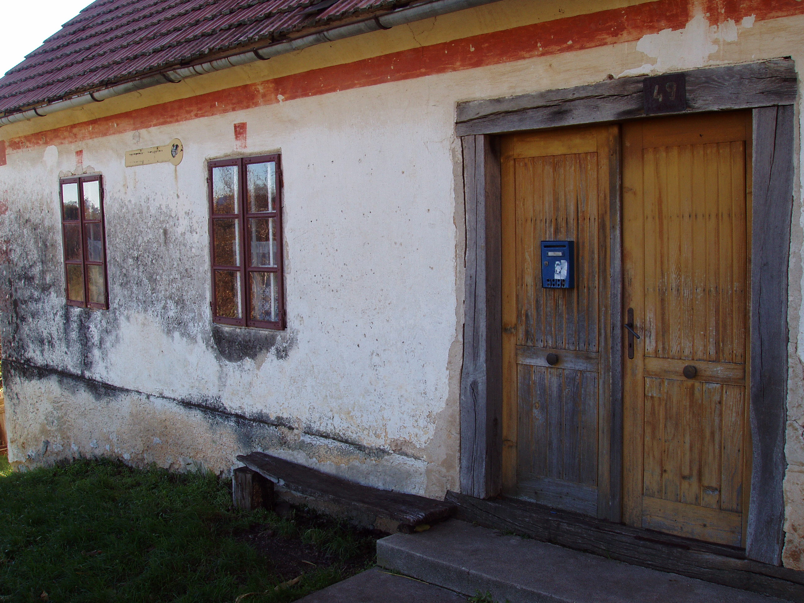 Gornji Oštrc 49